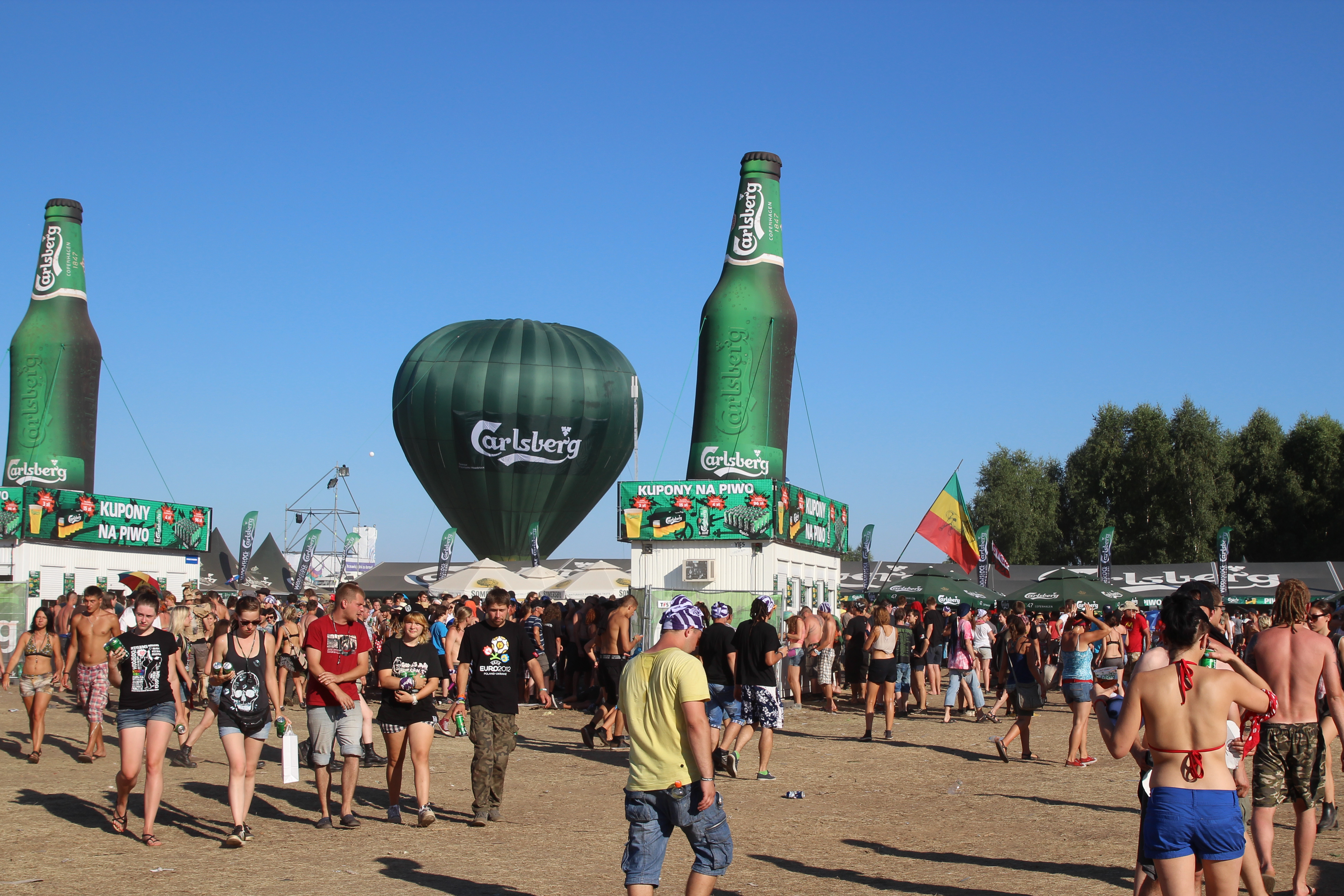 Przystanek Woodstock w 2013 r.